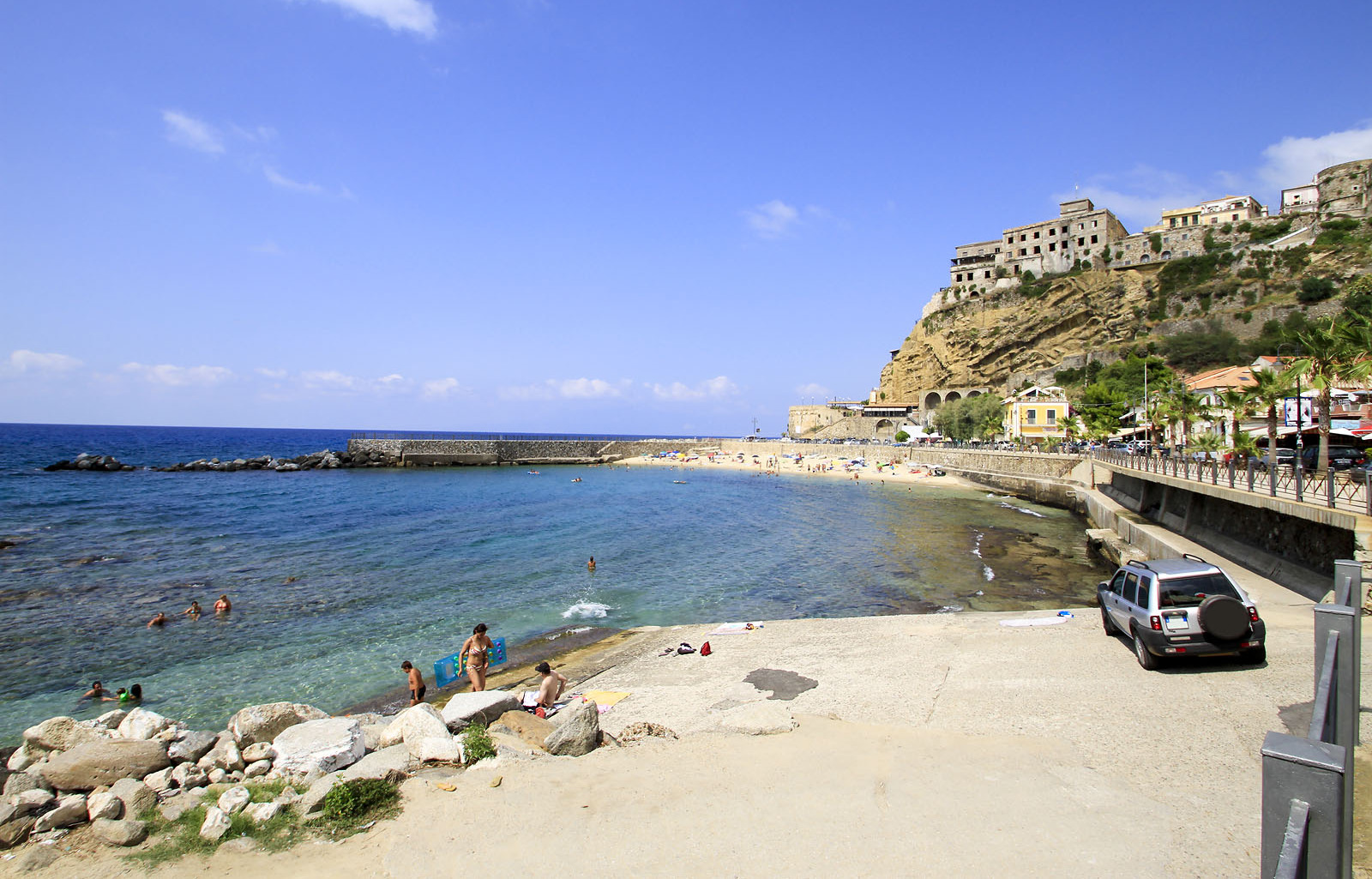 Spiaggia della marina di Pizzo Calabro